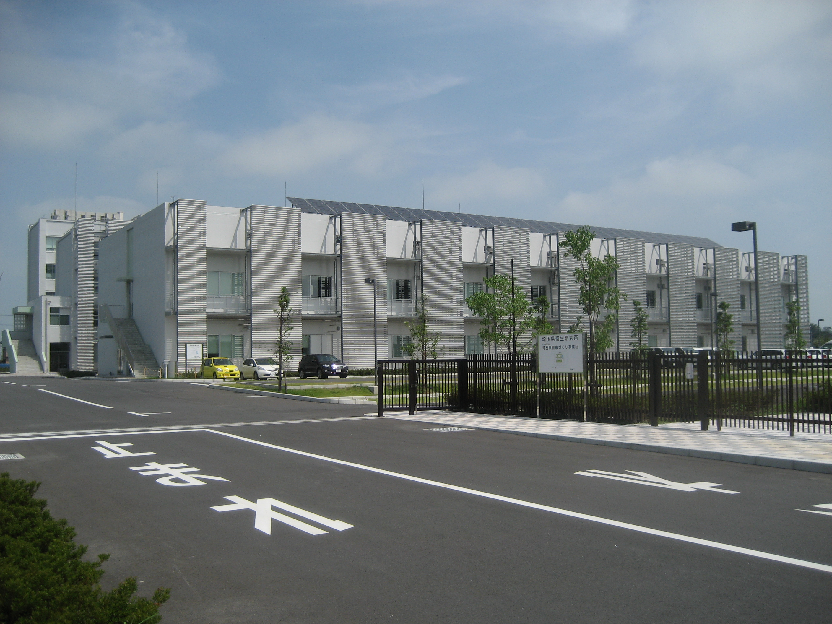 埼玉県吉見町にある埼玉県衛生研究所